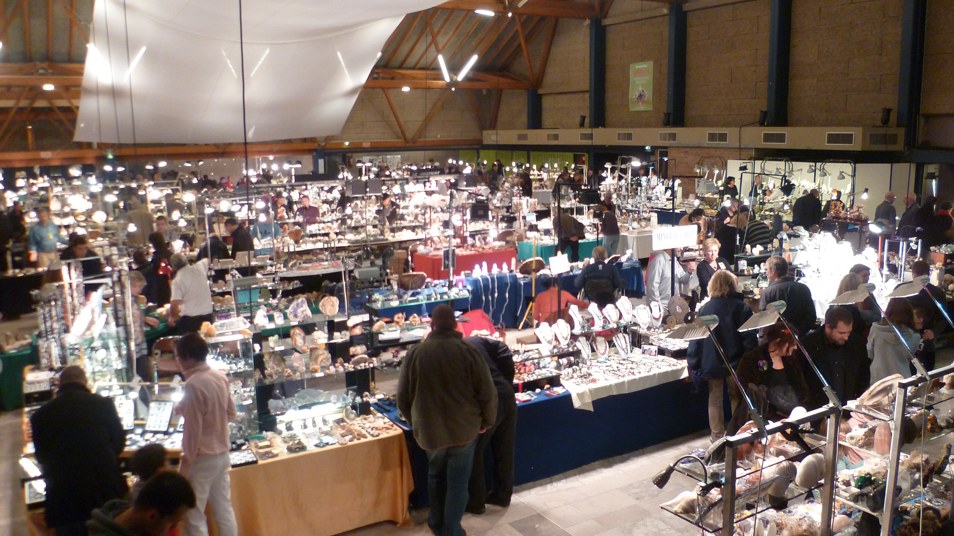 Photo de la foire aux minéraux Fossilium, à Villeneuve d'Ascq (Nord, France)